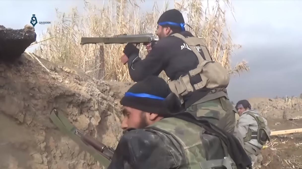 Rebelles de Jaych al-Islam à Qasmya, dans la Ghouta orientale, le 30 janvier 2017, lors de la guerre civile syrienne.